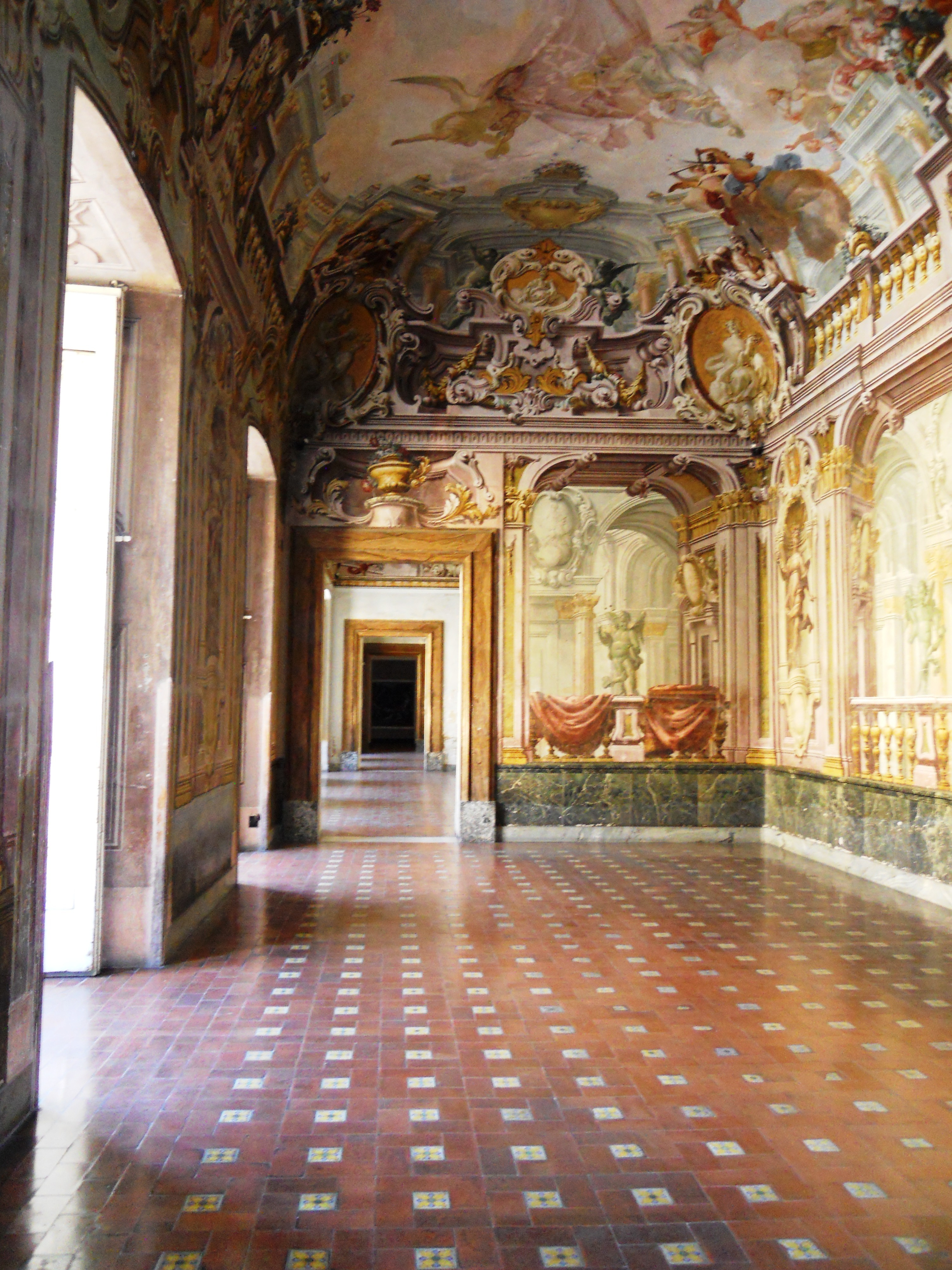 Reggia di Portici - interno